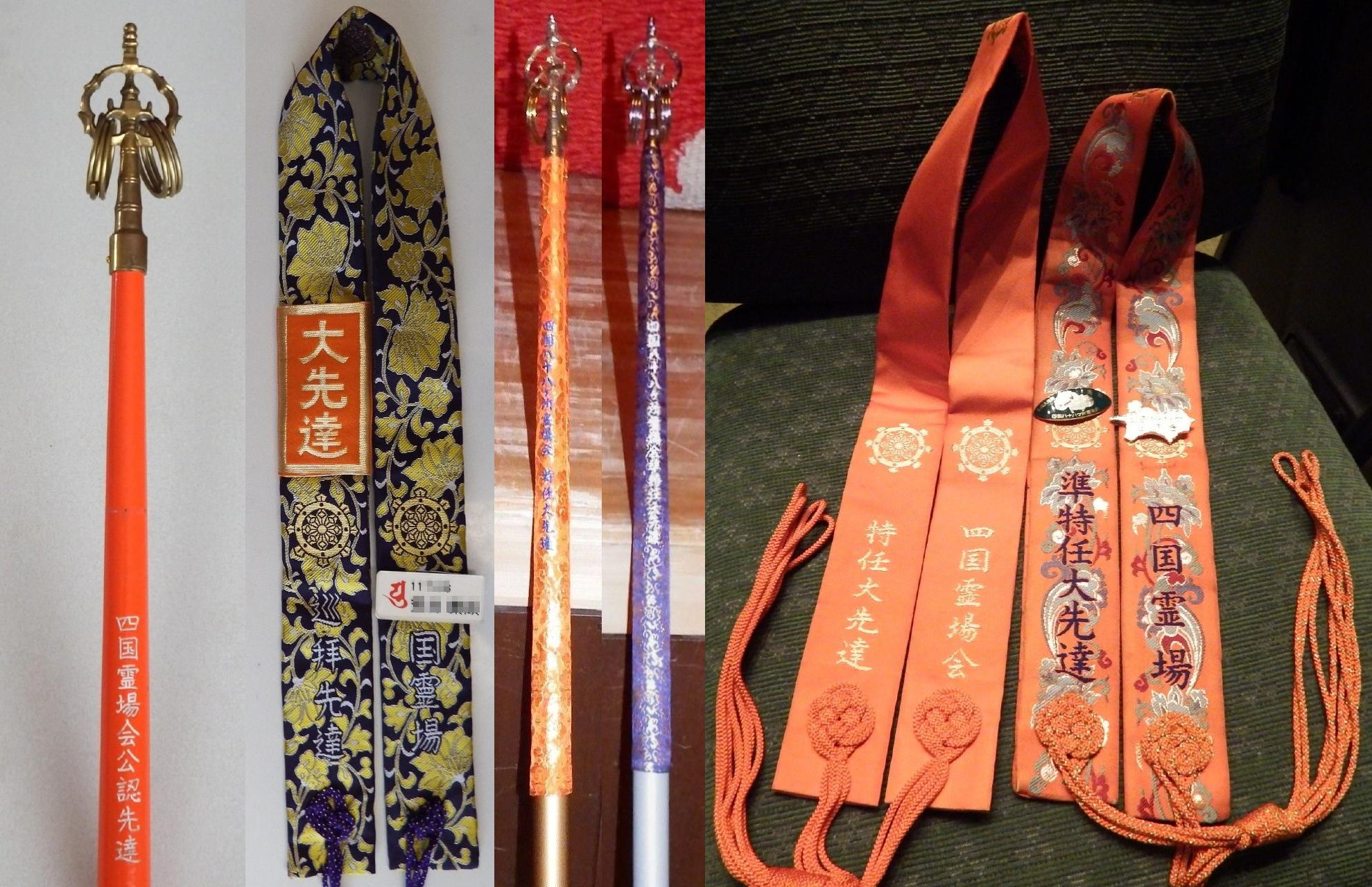 四国八十八ケ所公認先達の杖と袈裟